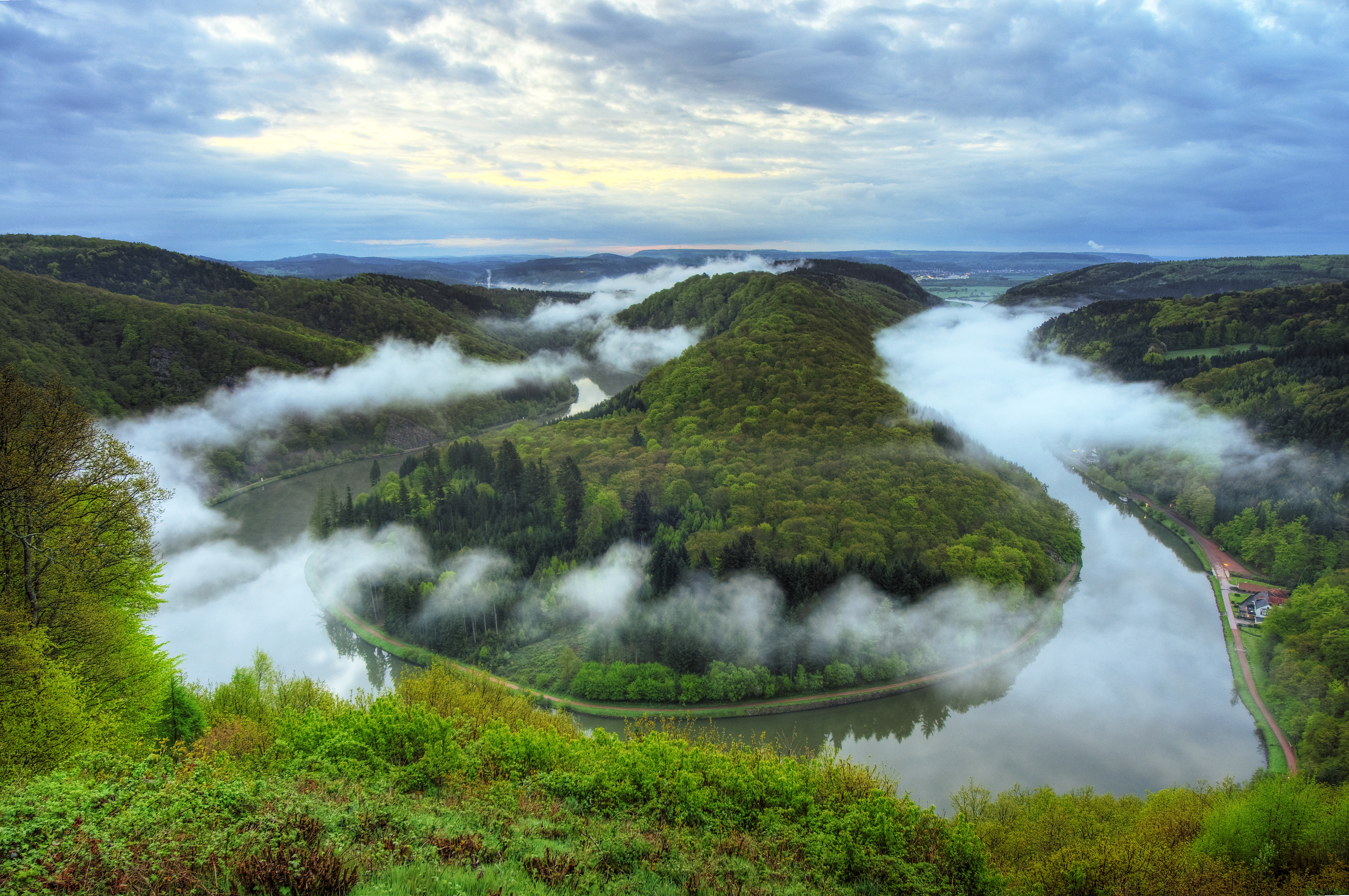 Saarschleife